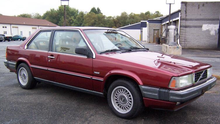 Volvo 780 coupe